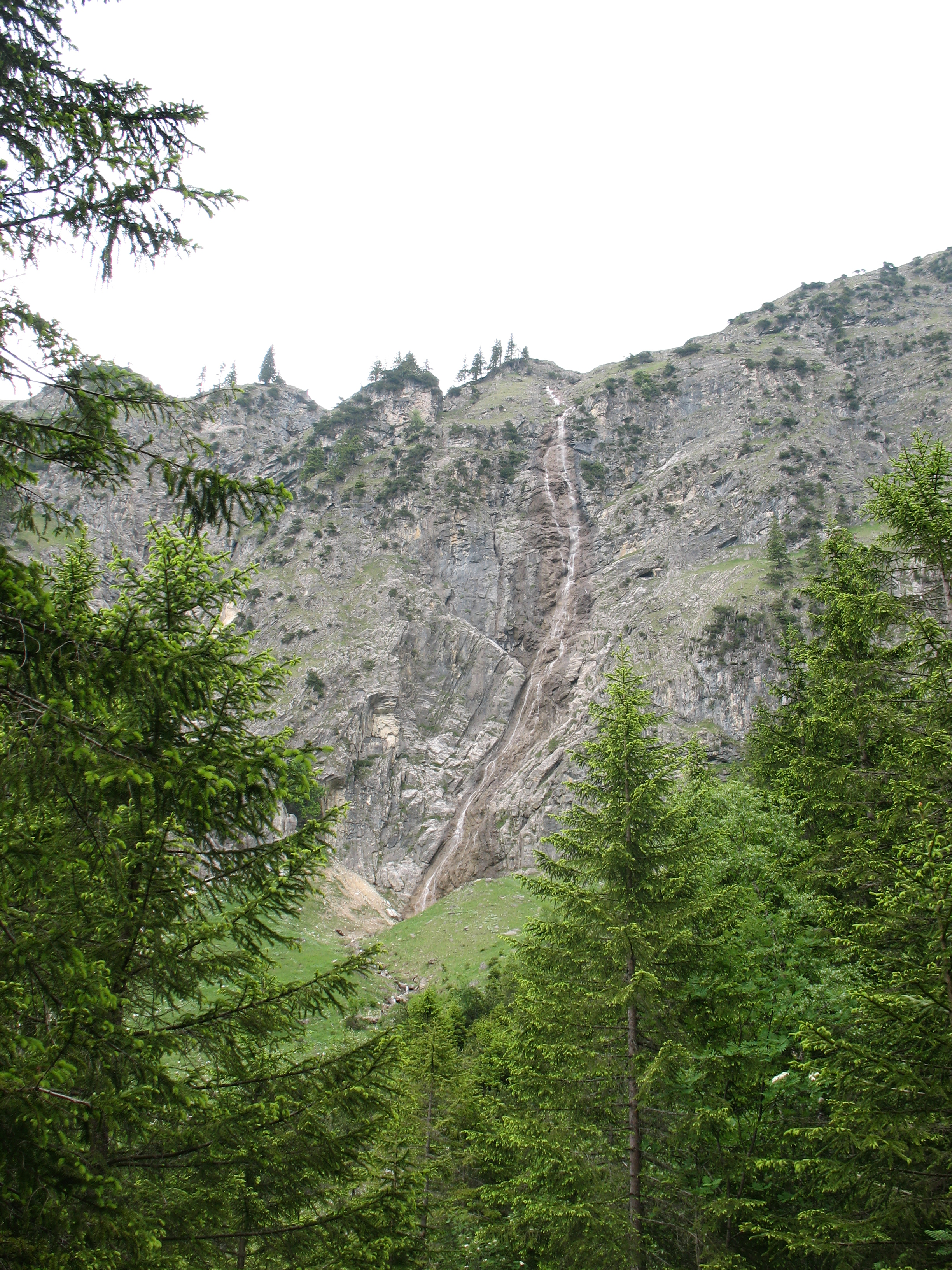 Östlicher Zufluss des Vilsalpsees (Wasserfall von der Blässe herab), gesehen im Abstieg vom Traualpsee.